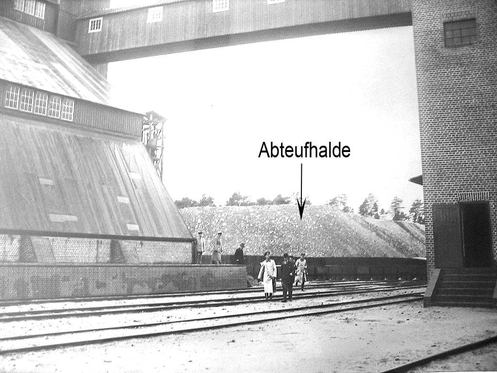 Lage der Abteufhalde des Schachtes Conow anno 1916 (links im Bild der Salzschuppen).